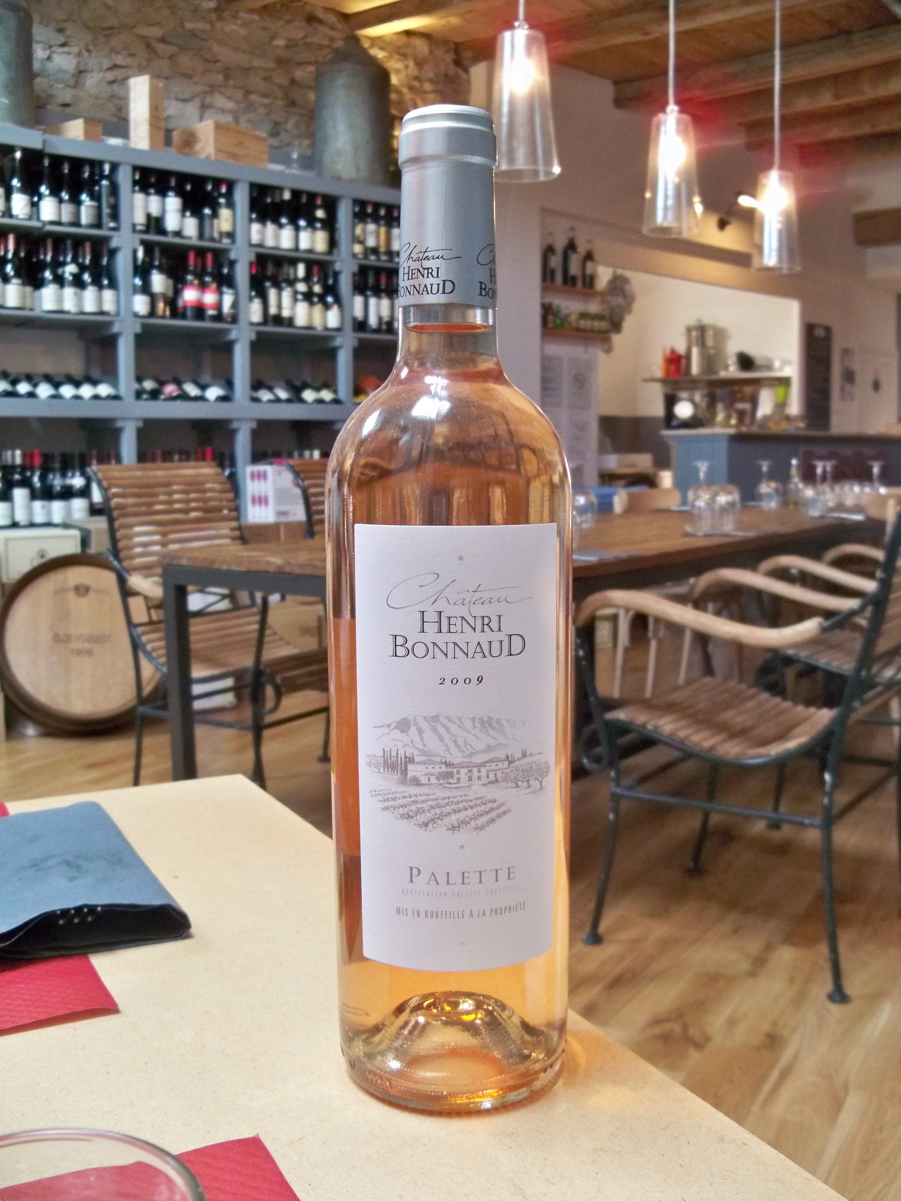 Bouteille de Palette AOC